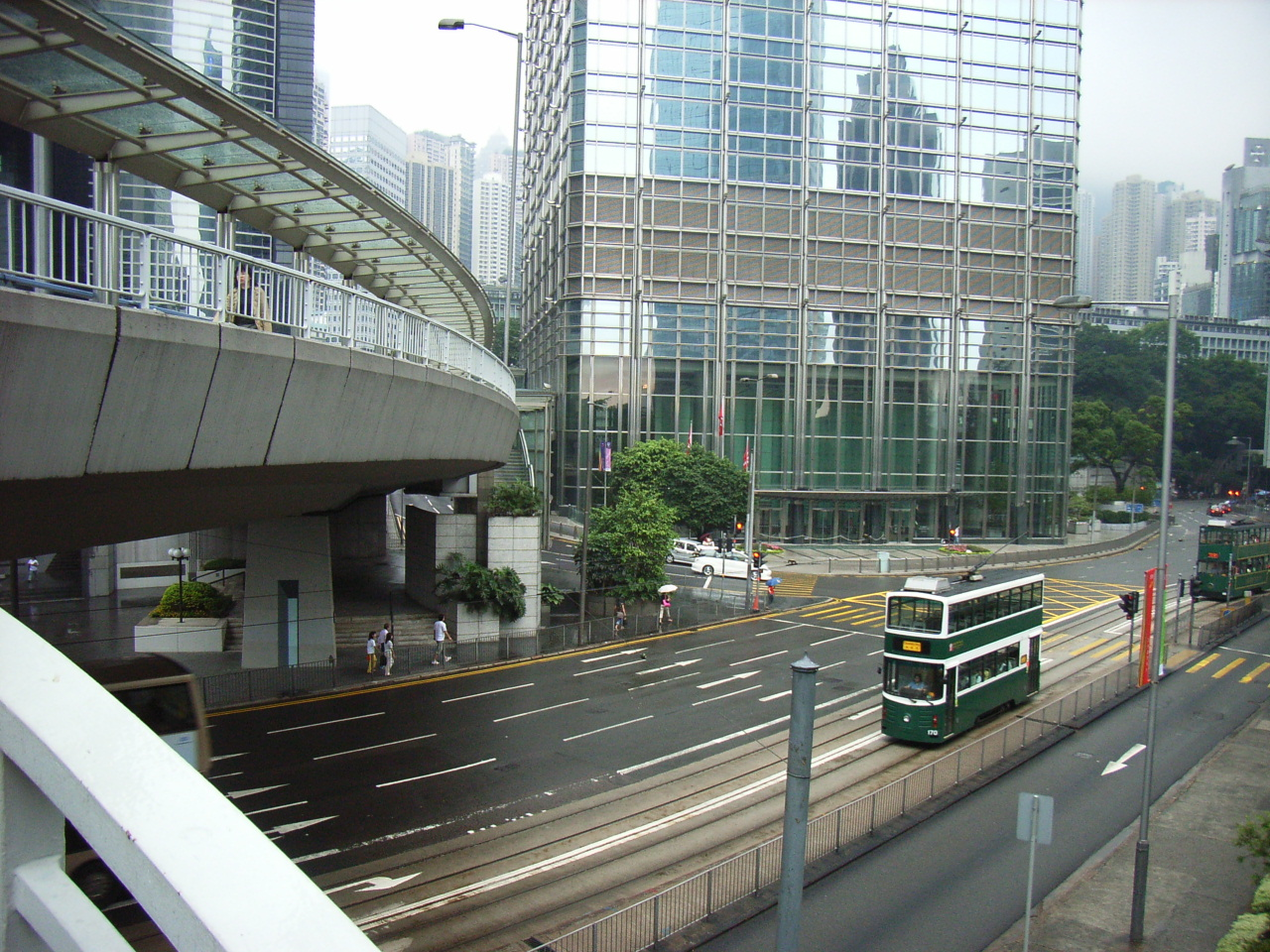 Cheung Kong Center 長江集團中心 PC652107